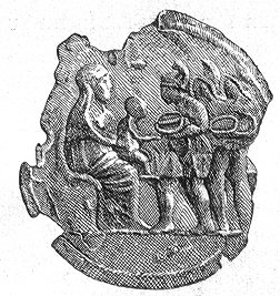 Die drei Weisen aus dem Morgenland beten Jesus auf dem Schoss von Maria an. Anbetung der Magier, aus Jeremias, Alfred: Babylonisches im Neuen Testament. Leipzig. 1905. & p.51 n.1